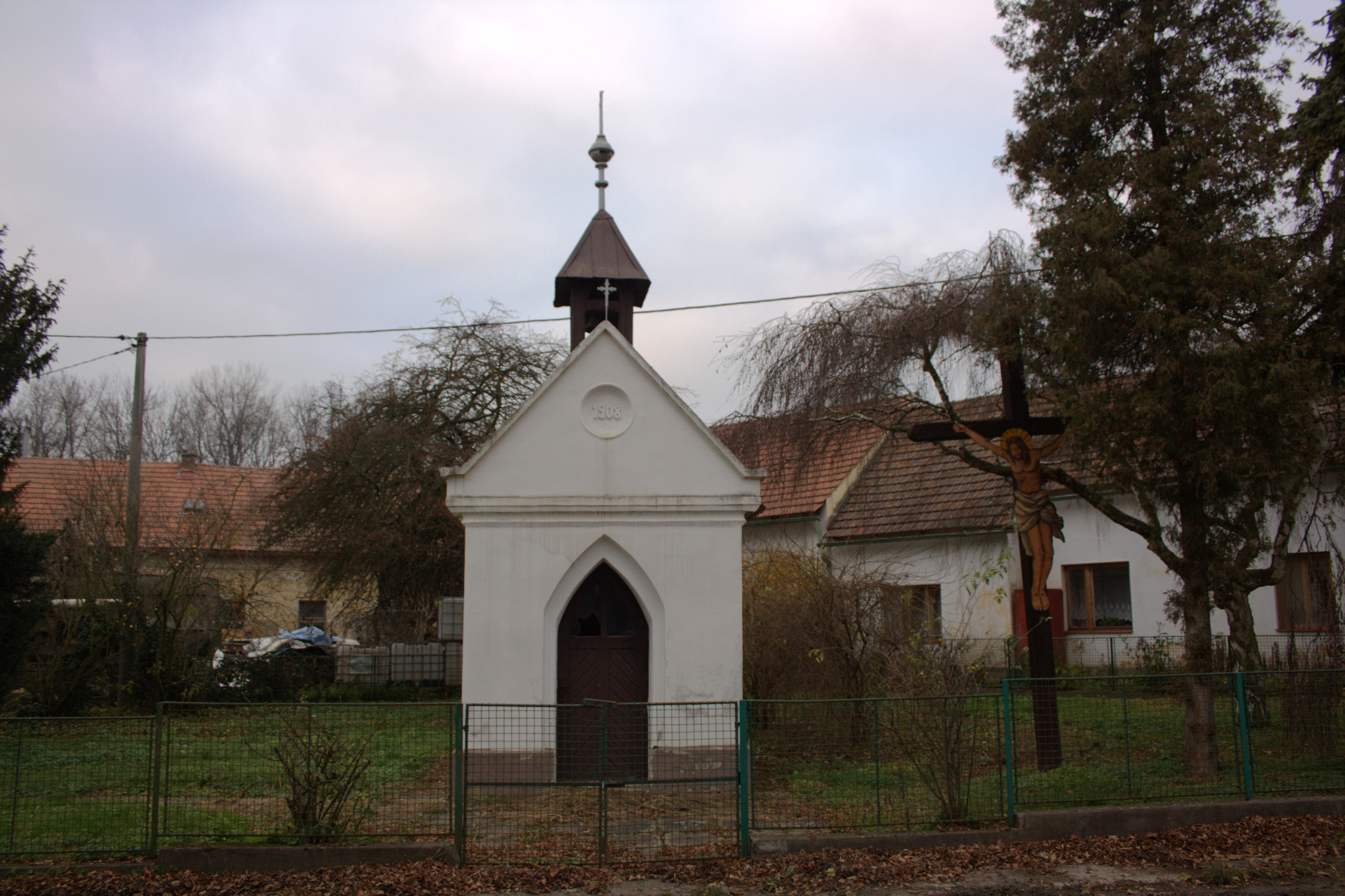 Kaplička v Jelenici, součásti Malého Újezda (pohled od jihovýchodu).